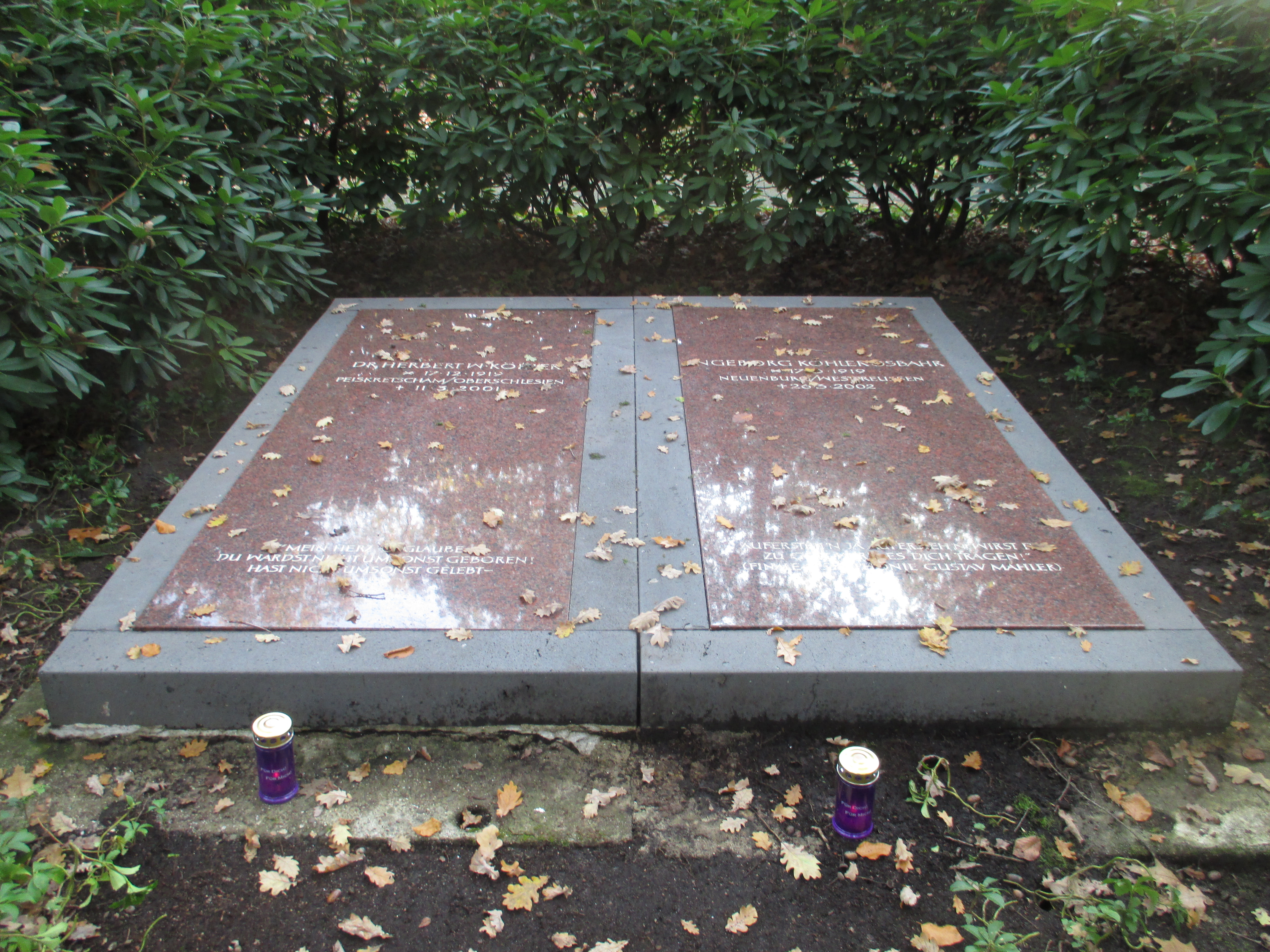 Grab von Herbert W. Köhler und Ingeborg Köhler-Osbahr. Sie gründeten 1986 die Köhler-Osbahr-Stiftung zur Förderung von Kunst und Wissenschaft